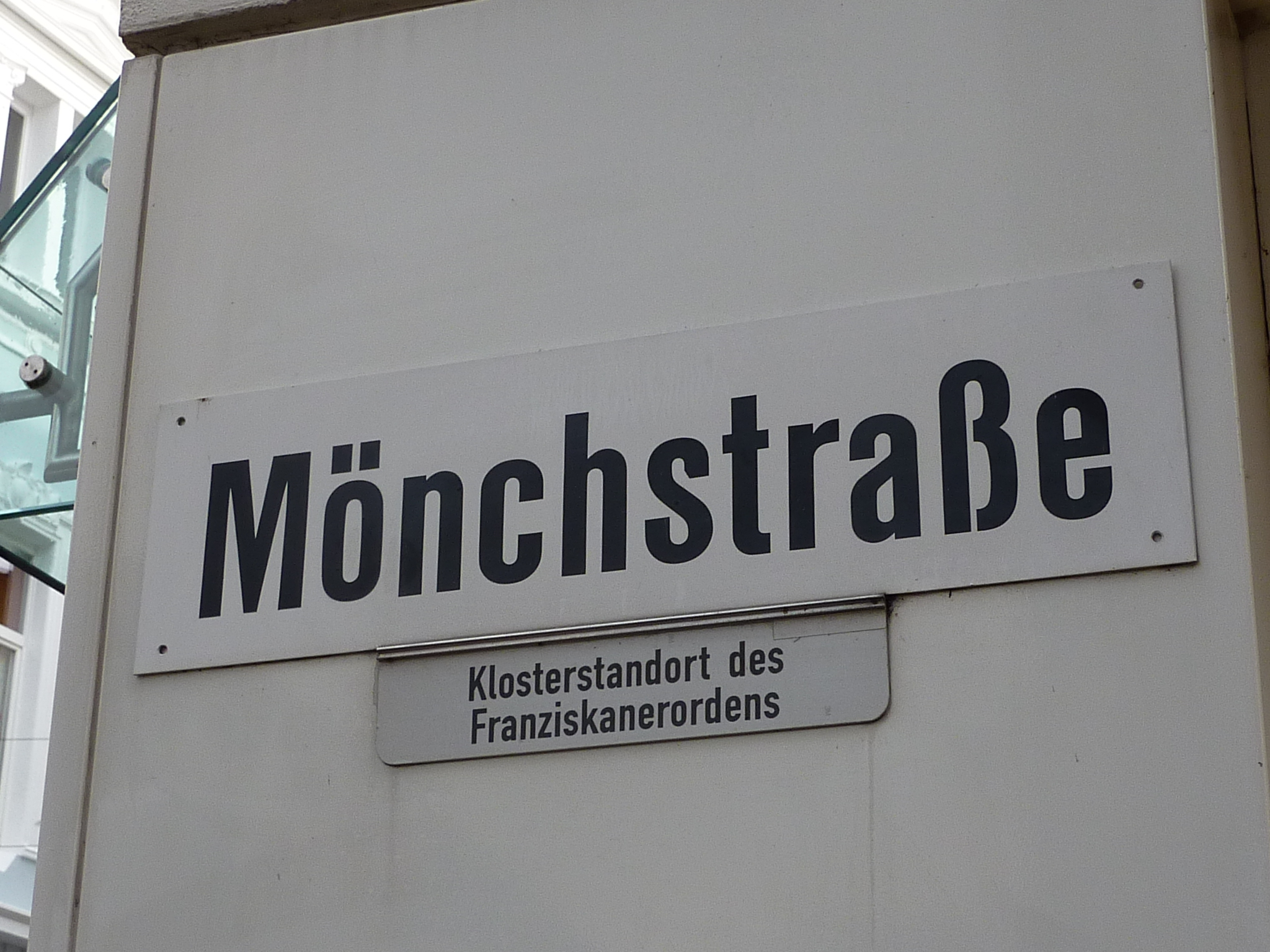 Schild Mönchstr. Herford